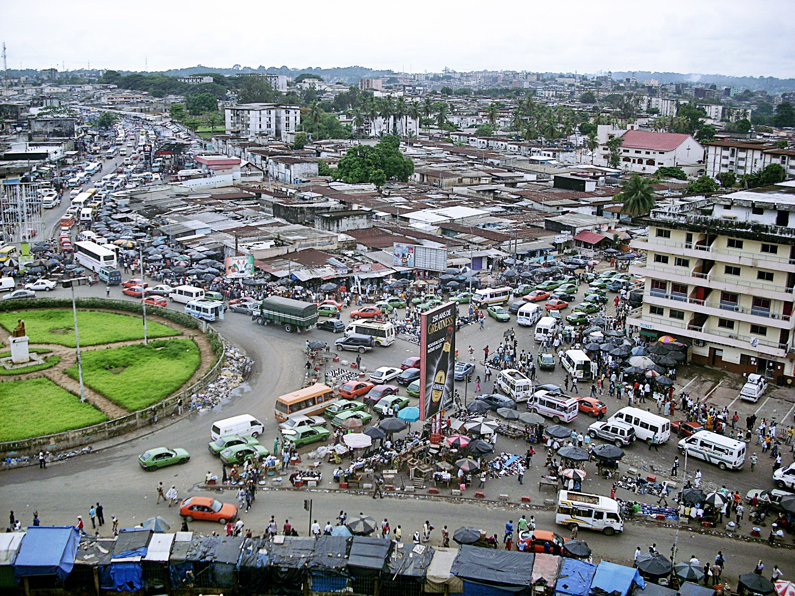 Le rond-point Liberté, dans le quartier des 220 logements de la commune d'Adjamé, à Abidjan.